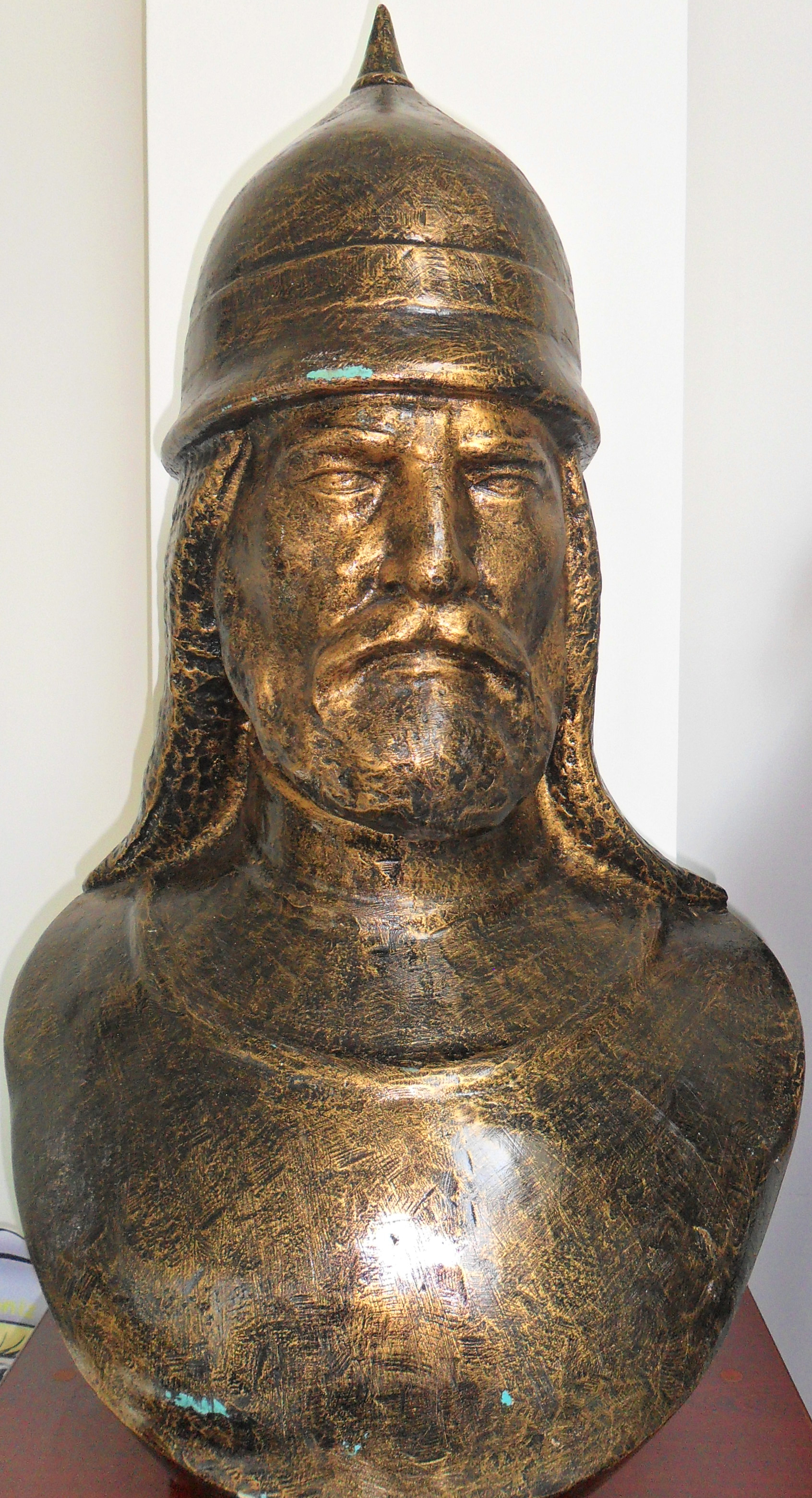 Mersin Deniz Müzesinde bulunan Çaka Bey büstü.